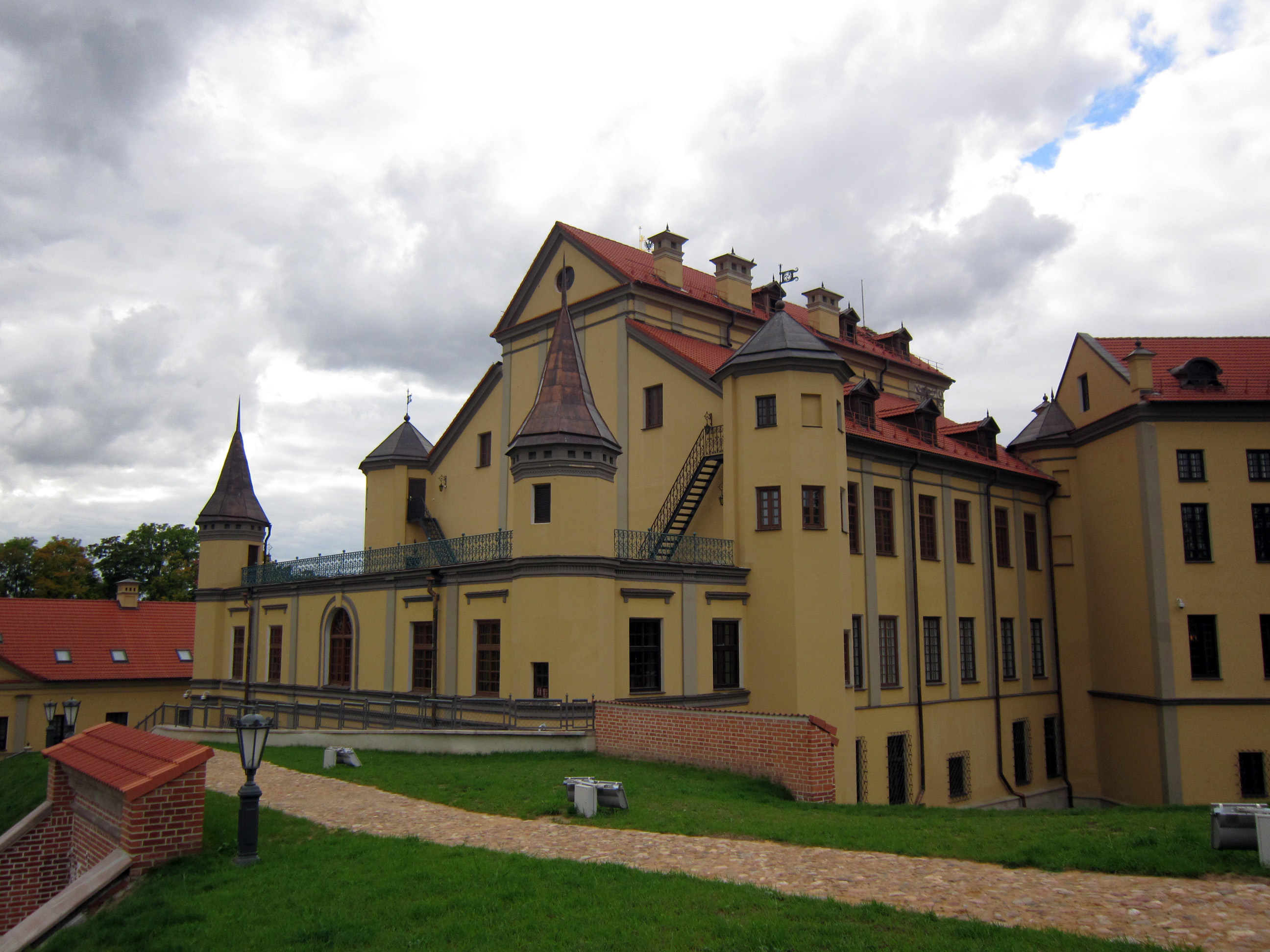 Несвижский замок.